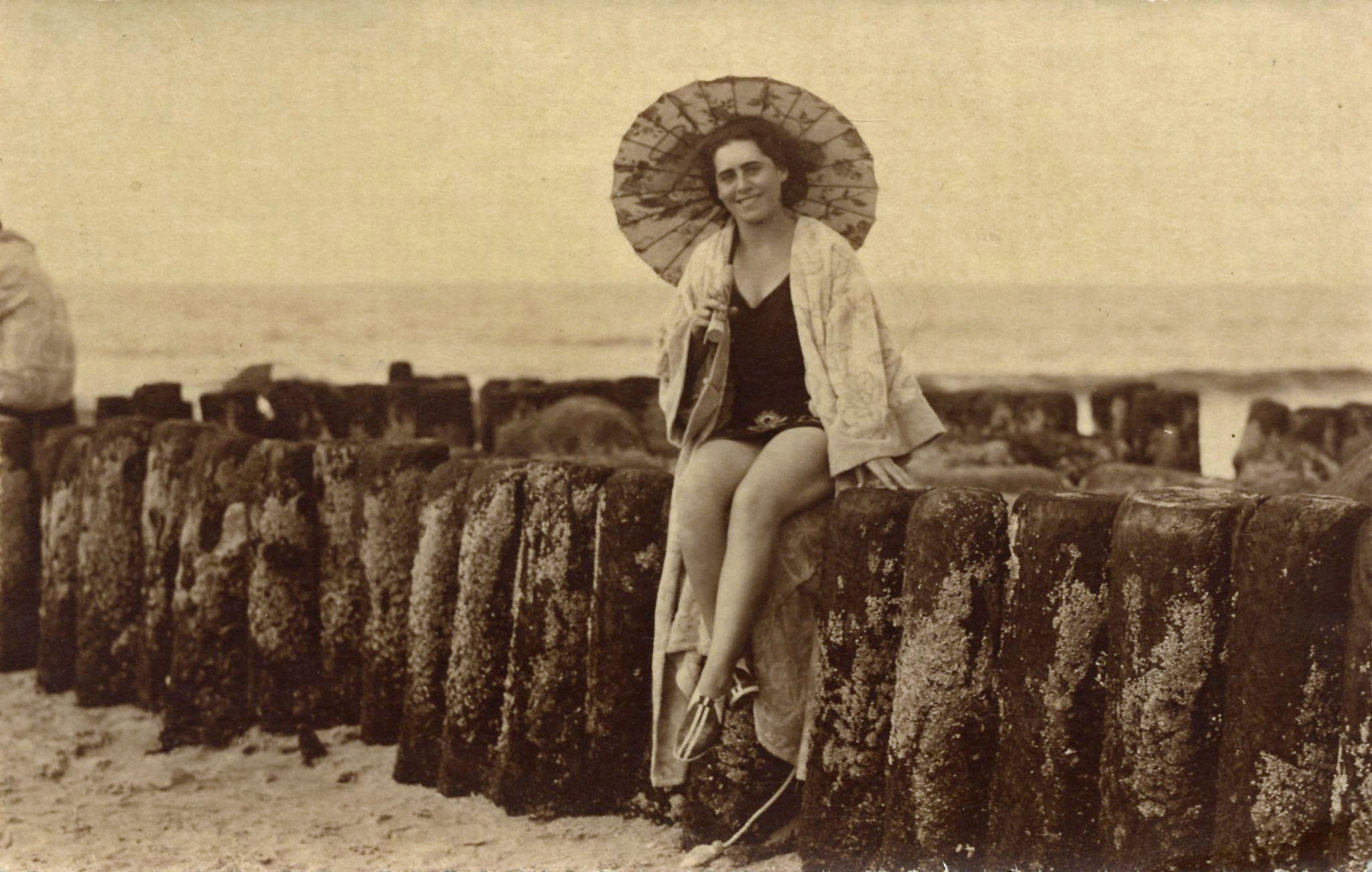 Frau auf Buhne sitzend